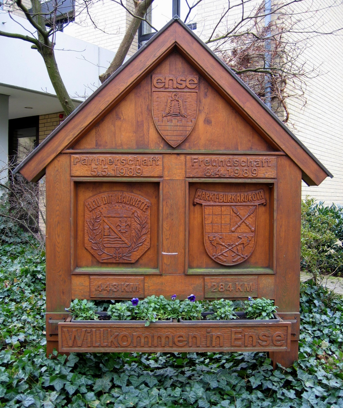 Schild vor dem Rathaus in Bremen (Ense), Gemeinde Ense.